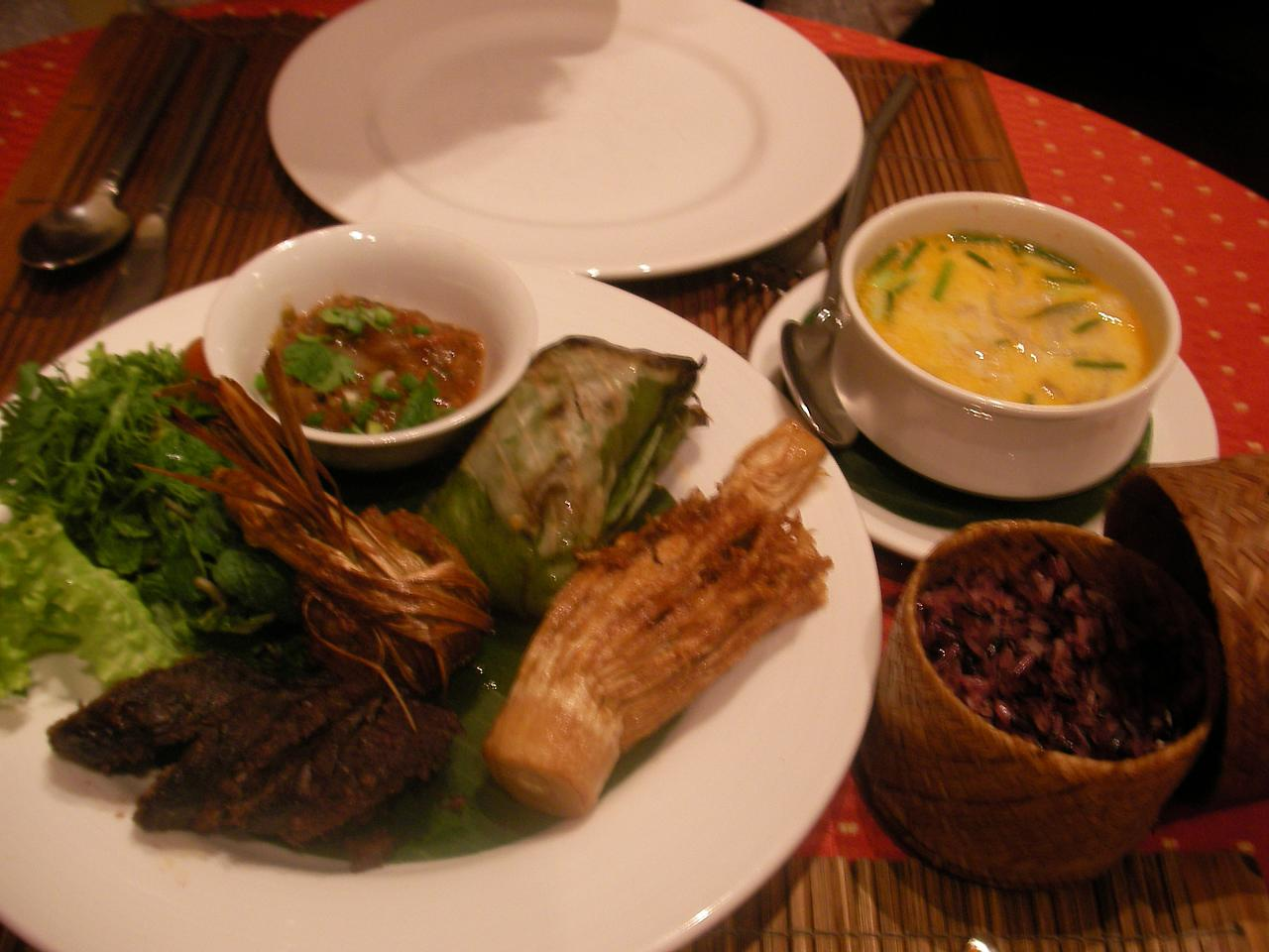 Luang Prabang, Laos February 2008